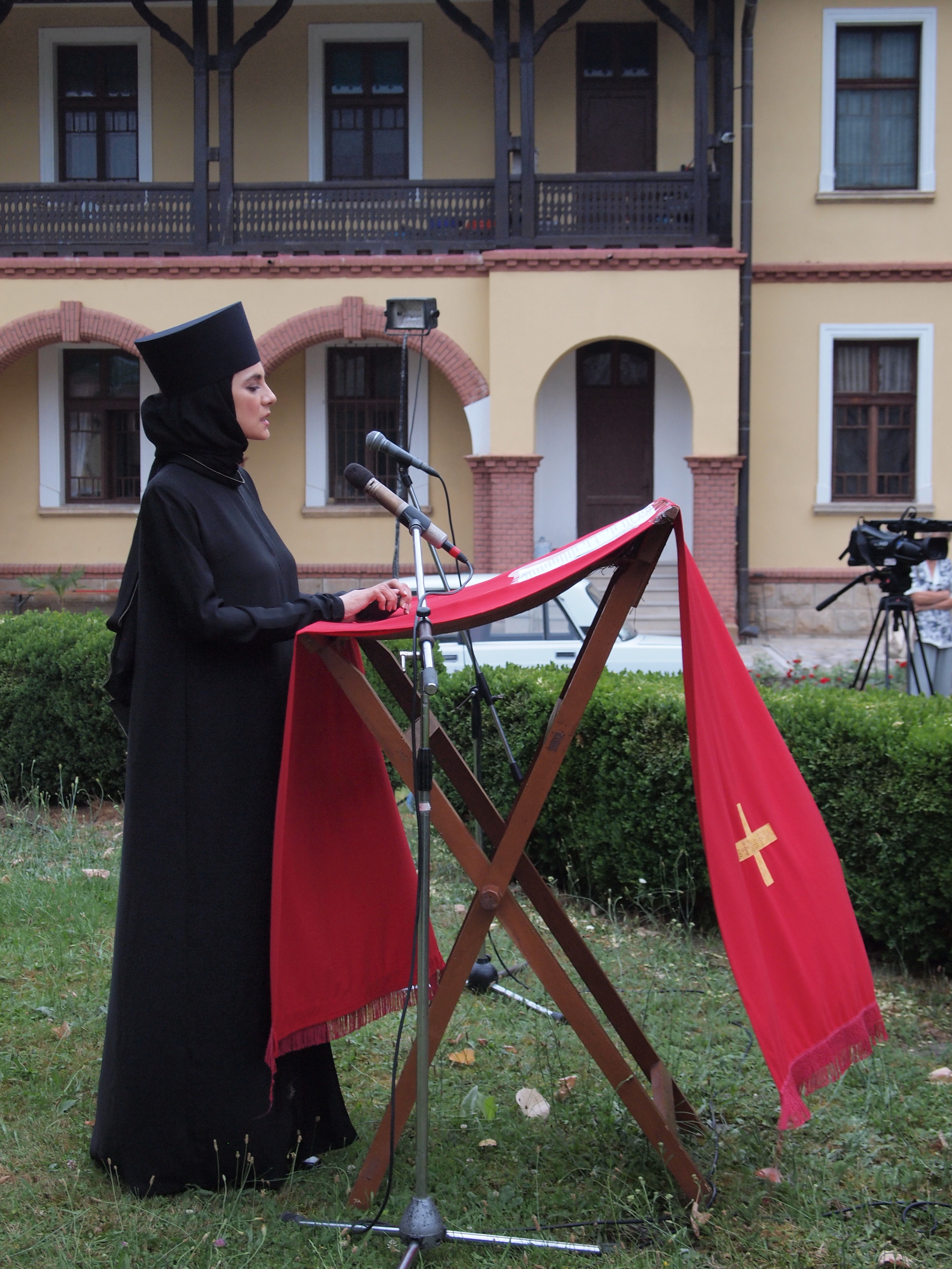 Српски (ћирилица): Glumica Vjera Mujović kao monahinja Jefimija na završnoj večeri manifestacije Jefimijini dani 2018. godine u porti manastira Ljubostinja